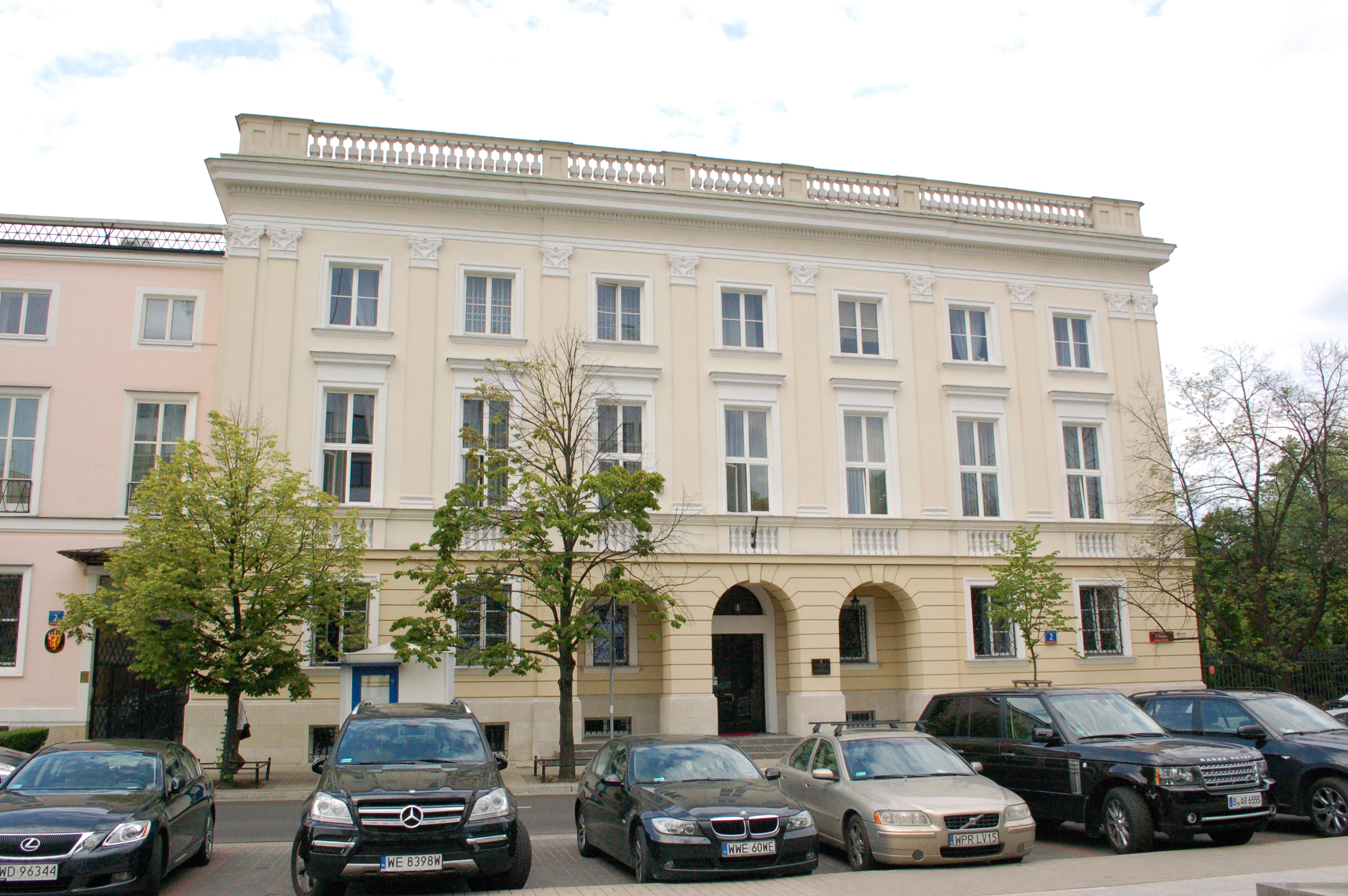 Warschau